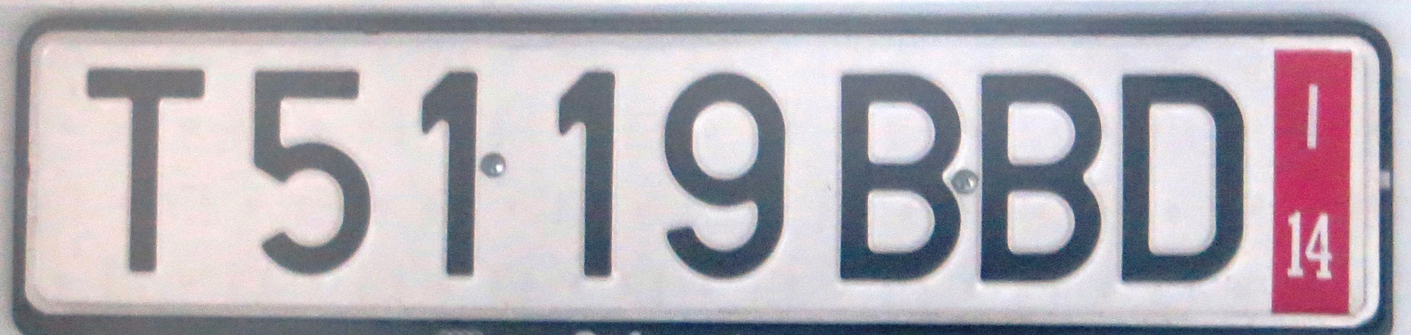 Bijzonder kenteken Spanje